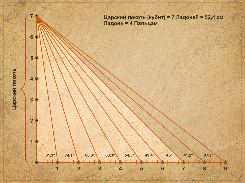 Древнеегипетская единица измерения угла.